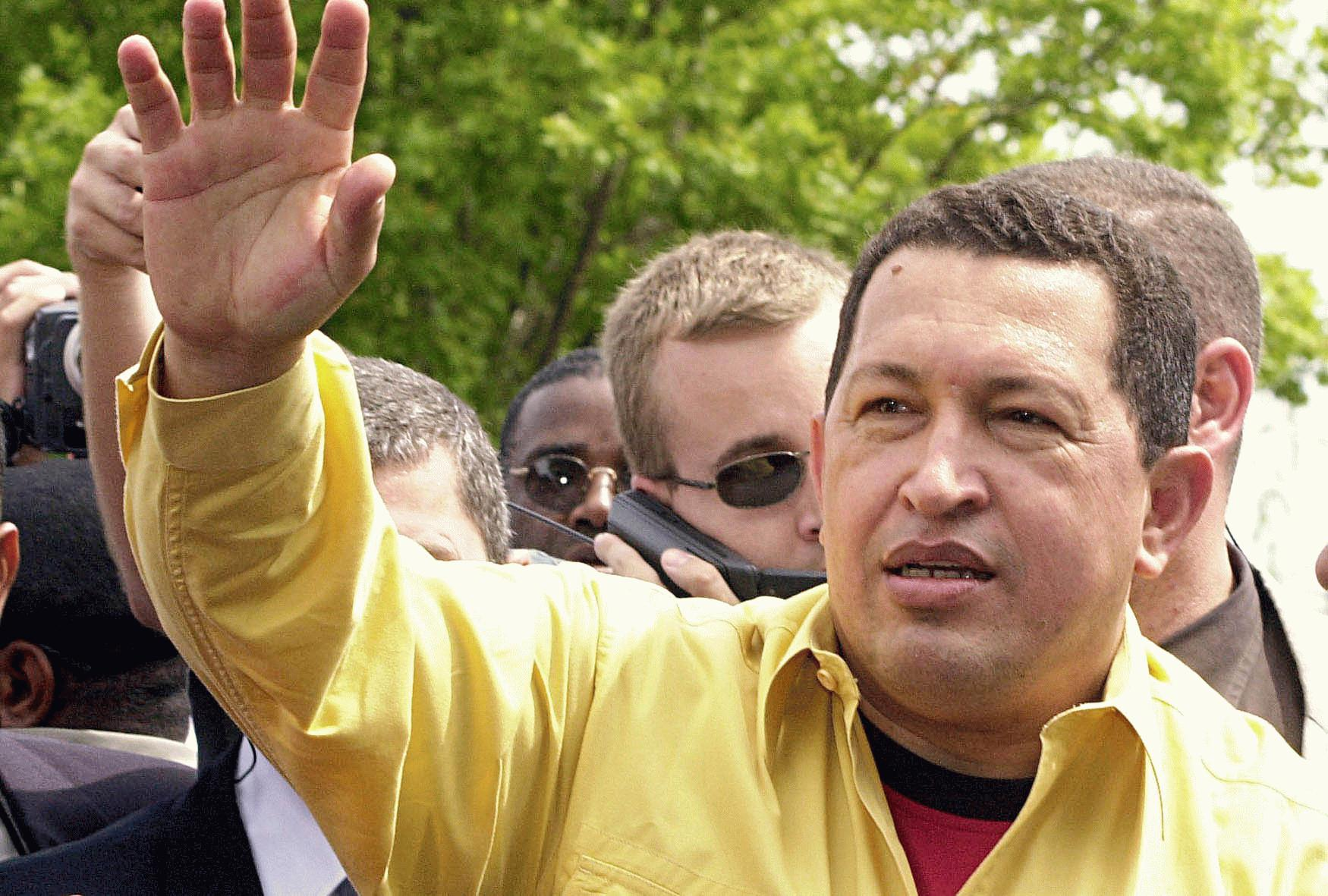 Hugo Chávez in Porto Alegre, Brazil. Jan/26/2003. Porto Alegre (RS), 26/01/2003 (Agência Brasil - ABr) - Presidente da Venezuela, Hugo Chávez, acena para populares após desembarcar no Aeroporto Salgado Filho. (Foto: Victor Soares - ABr - hor-15)